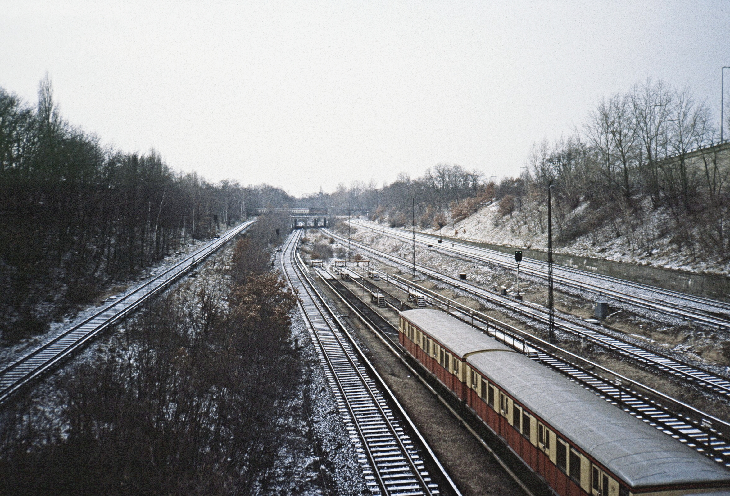 Streckenverzweigung am Bahnhof Berlin Westkreuz